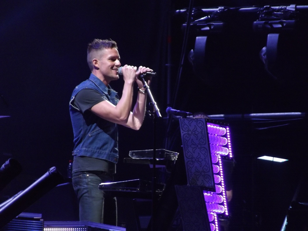 Zdjęcie zrobione podczas pierwszego dnia Coke Live Music Festival 2012 w Krakowie.